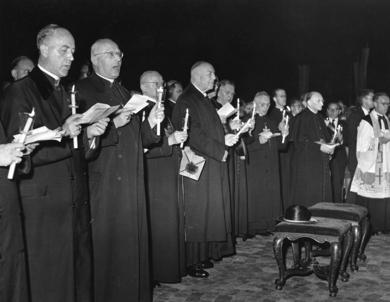 31.8-5.9.1954 76. Deutscher Katholikentag in Fulda Marienlied: v.l.n.r.: Kardinal Wendel, München Erzbischof Jäger, Paderborn Kardinal Griffin, London Erzbischof Berning, Osnabrück